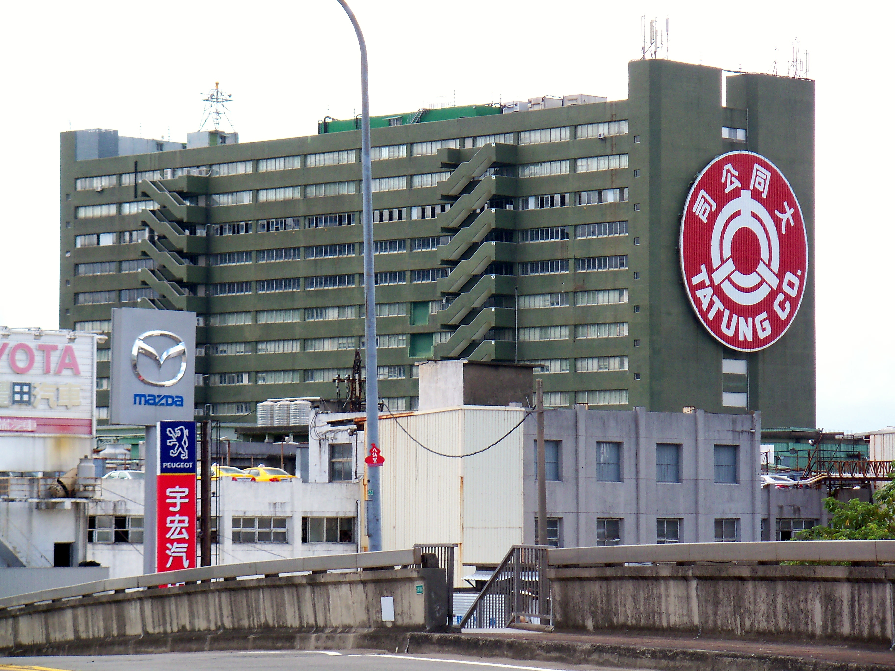 大同公司北投廠，位於臺北市北投區承德路七段400號，2011年11月23日售予富邦人壽以後改名為富邦承德大樓，2012年5月26至27日拆除北側外牆大同公司商標招牌，2012年6月2至3日拆除南側外牆大同公司商標招牌。攝於臺北捷運淡水線奇岩站西南、北投路一段正大橋上。